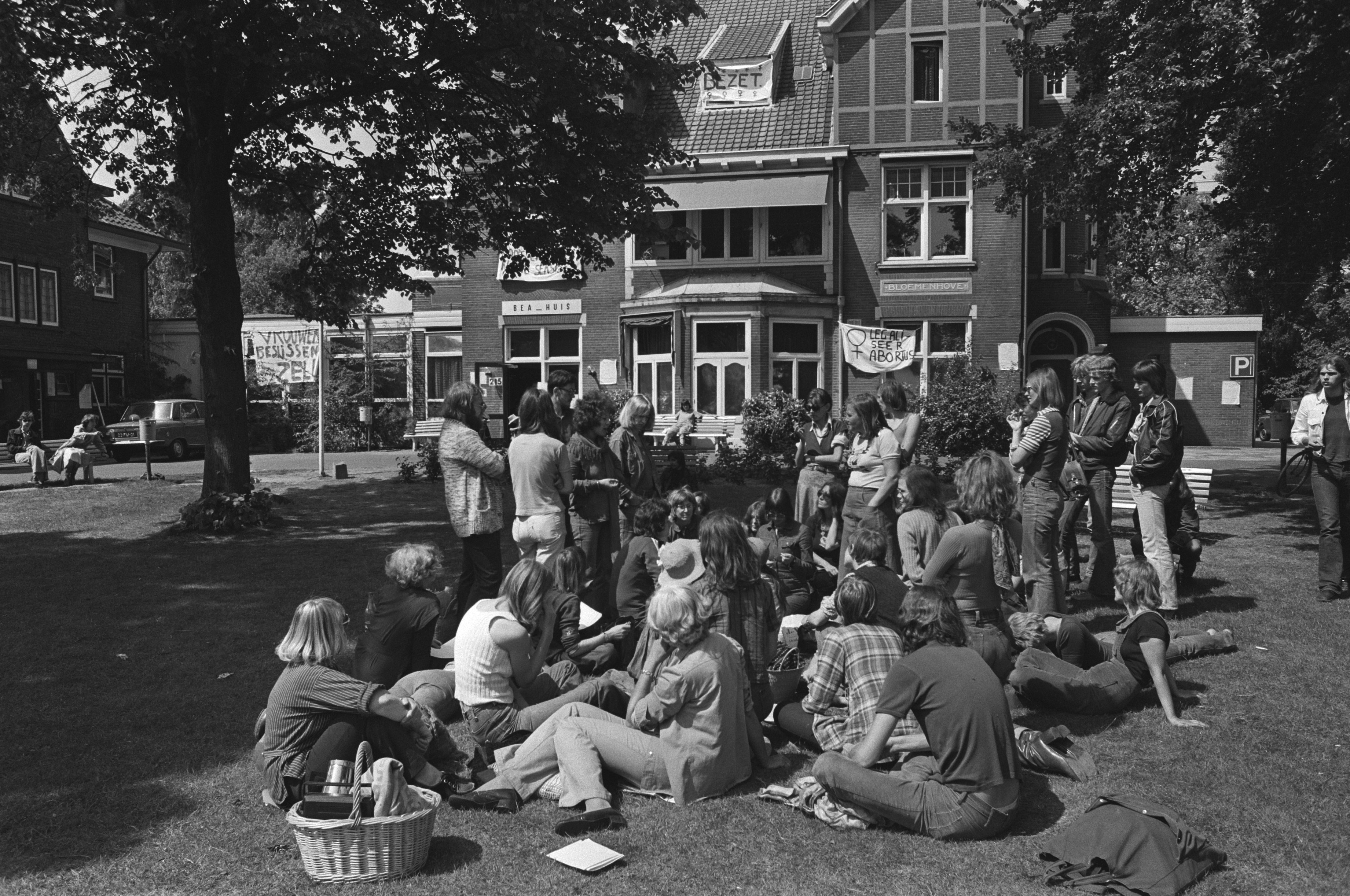 Collectie / Archief : Fotocollectie Anefo Reportage / Serie : [ onbekend ] Beschrijving : Bezetting Bloemenhovekliniek, Heemstede, bezetsters voor kliniek Datum : 25 mei 1976 Locatie : Heemstede Trefwoorden : BEZETTING, abortussen, klinieken Fotograaf : Peters, Hans / Anefo Auteursrechthebbende : Nationaal Archief Materiaalsoort : Negatief (zwart/wit) Nummer archiefinventaris : bekijk toegang 2.24.01.05 Bestanddeelnummer : 928-6045